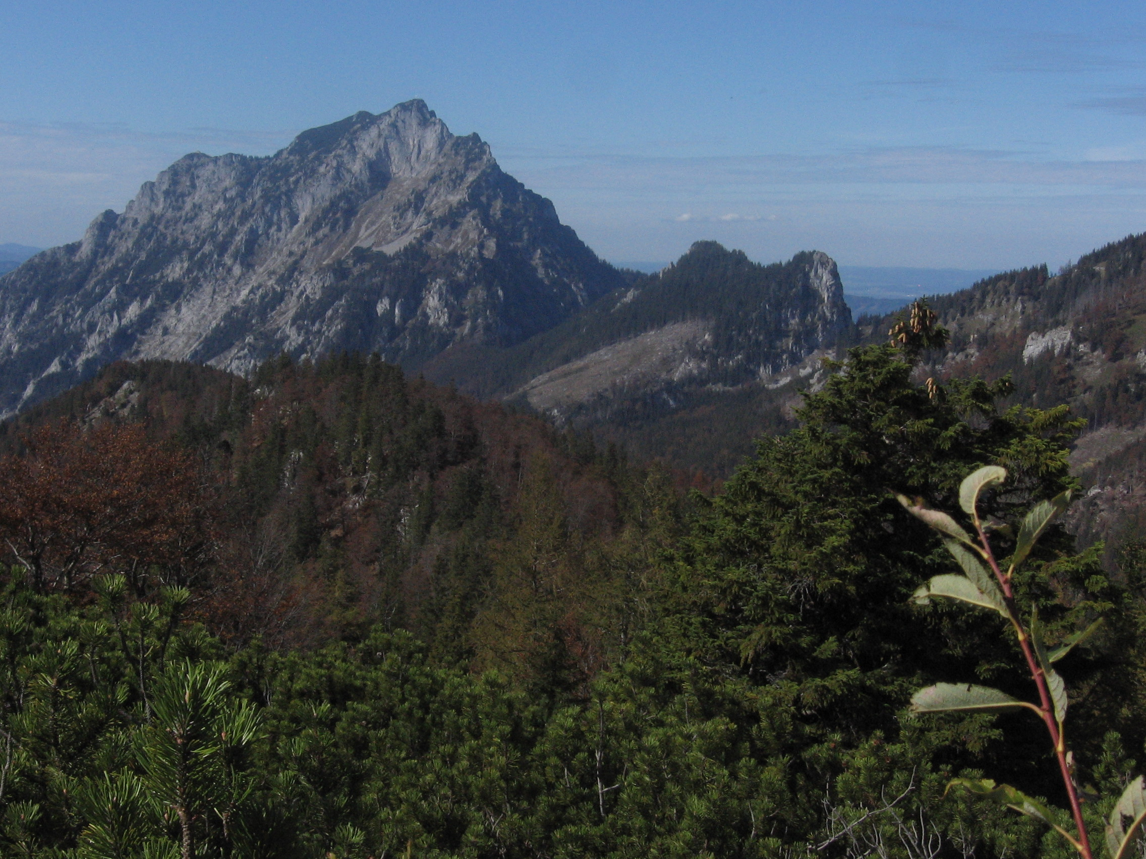 Traunstein (Berg)